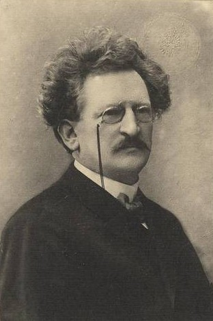 Jaroslav Bradáč (1876 - 1938), Český učitel a hudební skladatel.